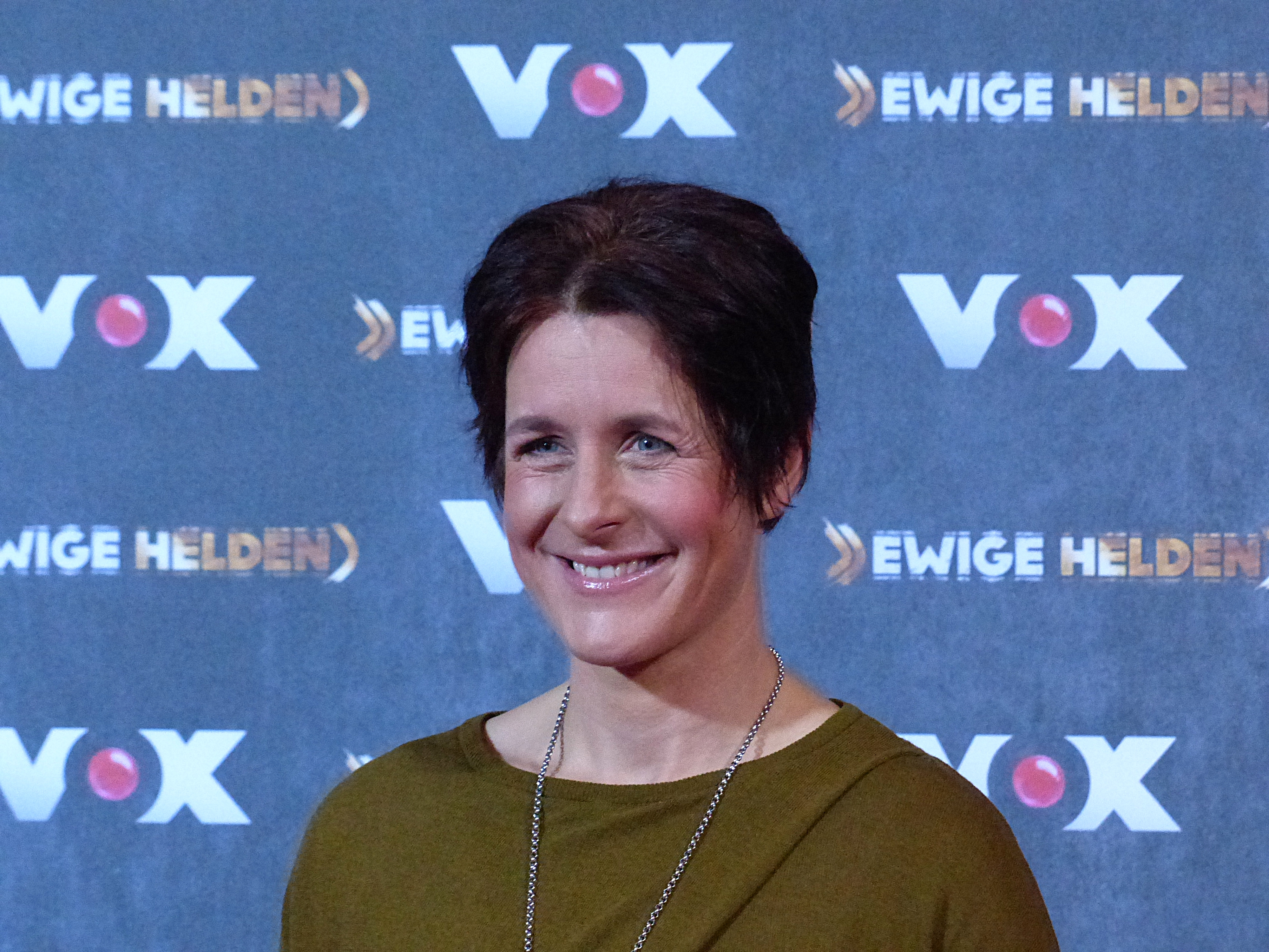 Uschi Disl beim VOX "Ewige Helden" Pressetermin, im Dezember 2015.